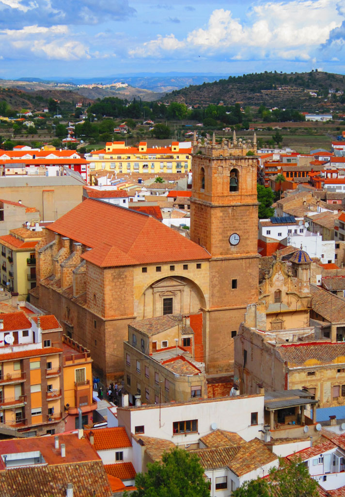 Iglesia de nuestra señora Asunción, Ayora. (Imagen cedida por M. Martínez)